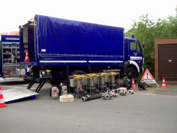 THW-LKW der Fachgruppe Wasserschaden/Pumpen mit Ausrüstung, hier u. a. Pumpensatz 1.000 bis 3.000 l/min